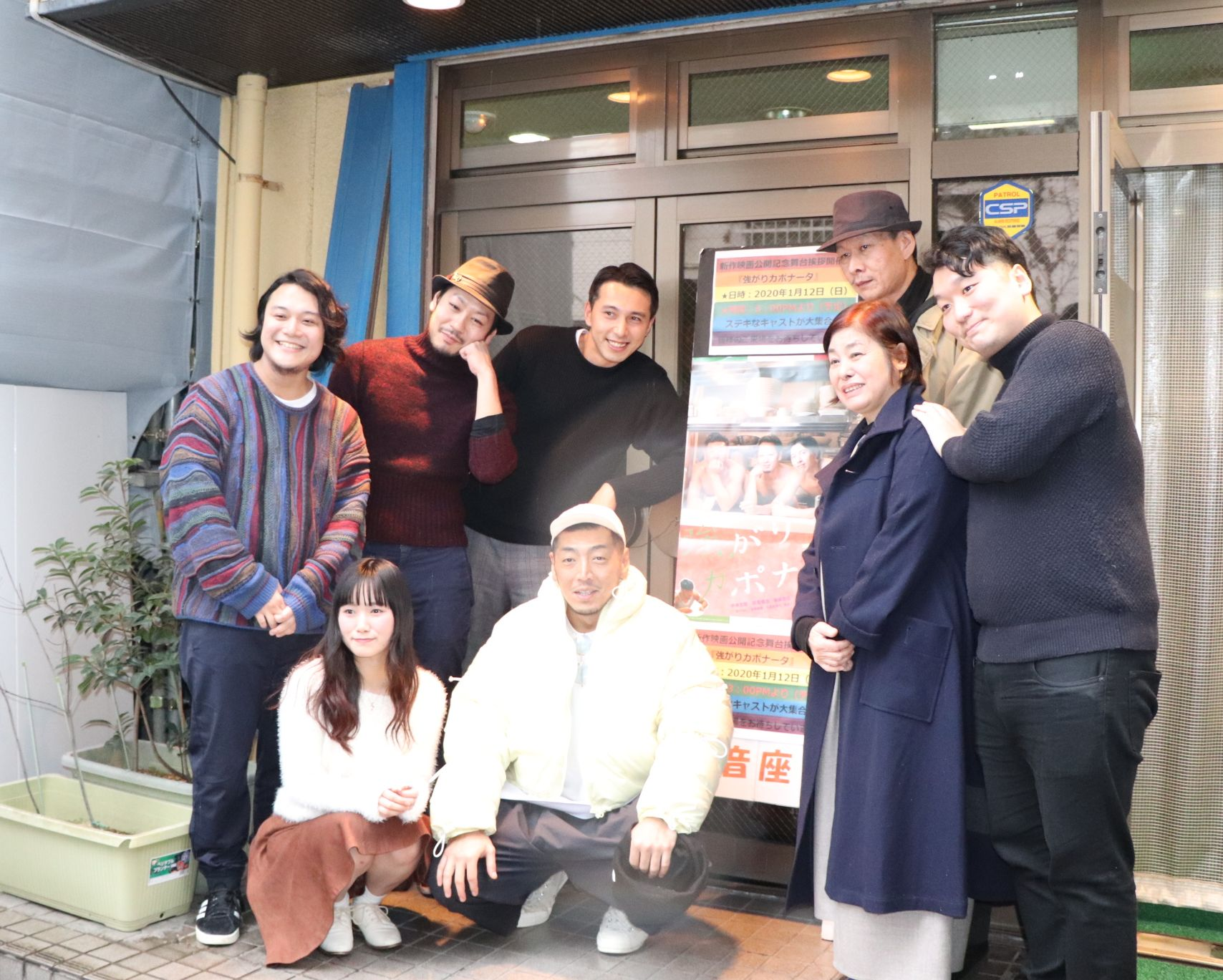 横浜光音座「強がりカポナータ」舞台あいさつ（2020年1月）キャスト・スタッフ一同